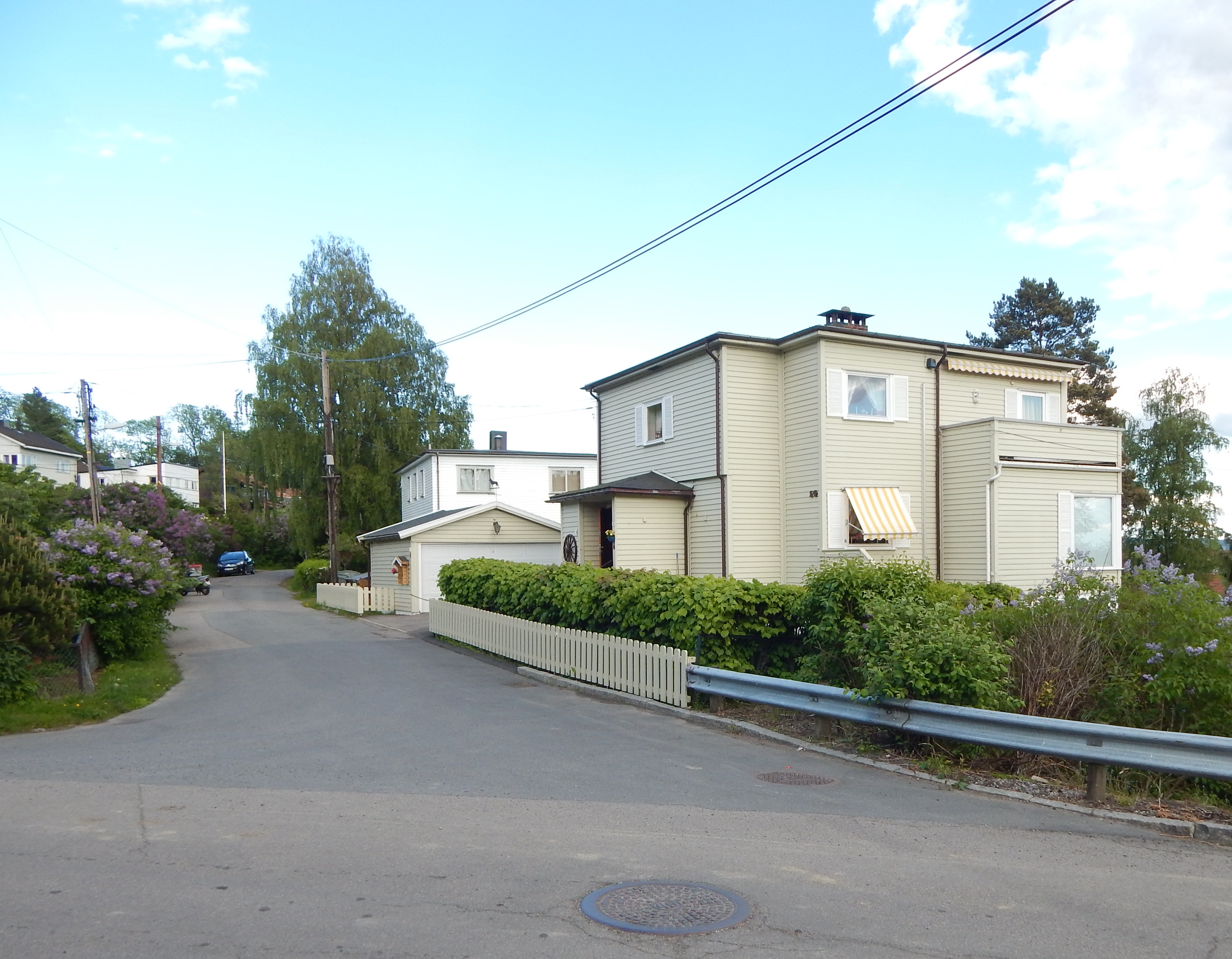 Bregneveien østover fra Borgestadveien